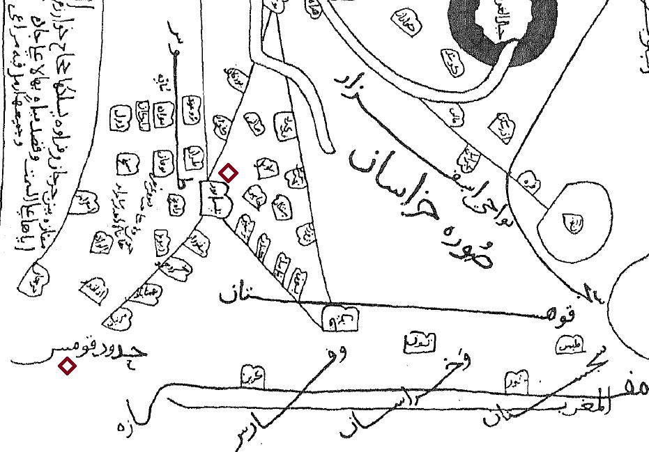 بریده‌ای از نقشه «خراسان» مندرج در کتاب «صورة‌ الارض» تالیف این حوقل (درگذشته در سال‌های پس از ۳۶۷ هجری)؛ ترسیم شده در قرن چهارم هجری؛ در این بریده نقاط مهم خراسان غربی آمده است و نقاط شاخص ناحیه بیهق (سبزوار، خسروجرد، بهمن‌آباد و مزینان) در چپ نگاره نقشه (در میانه راه قومس به نیشابور) دیده می‌شوند.